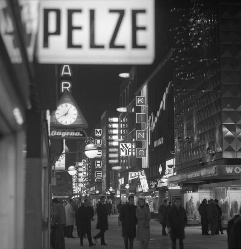 Köln: Nachtaufn. in der Hohe Strasse